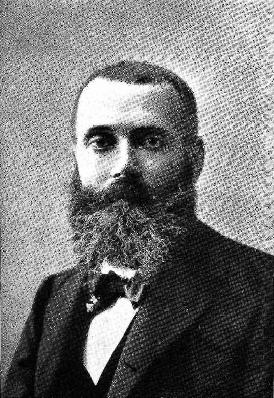 Armando Palacio Valdés, obra del fotógrafo Manuel Compañy, recogido en la revista española Por esos mundos.